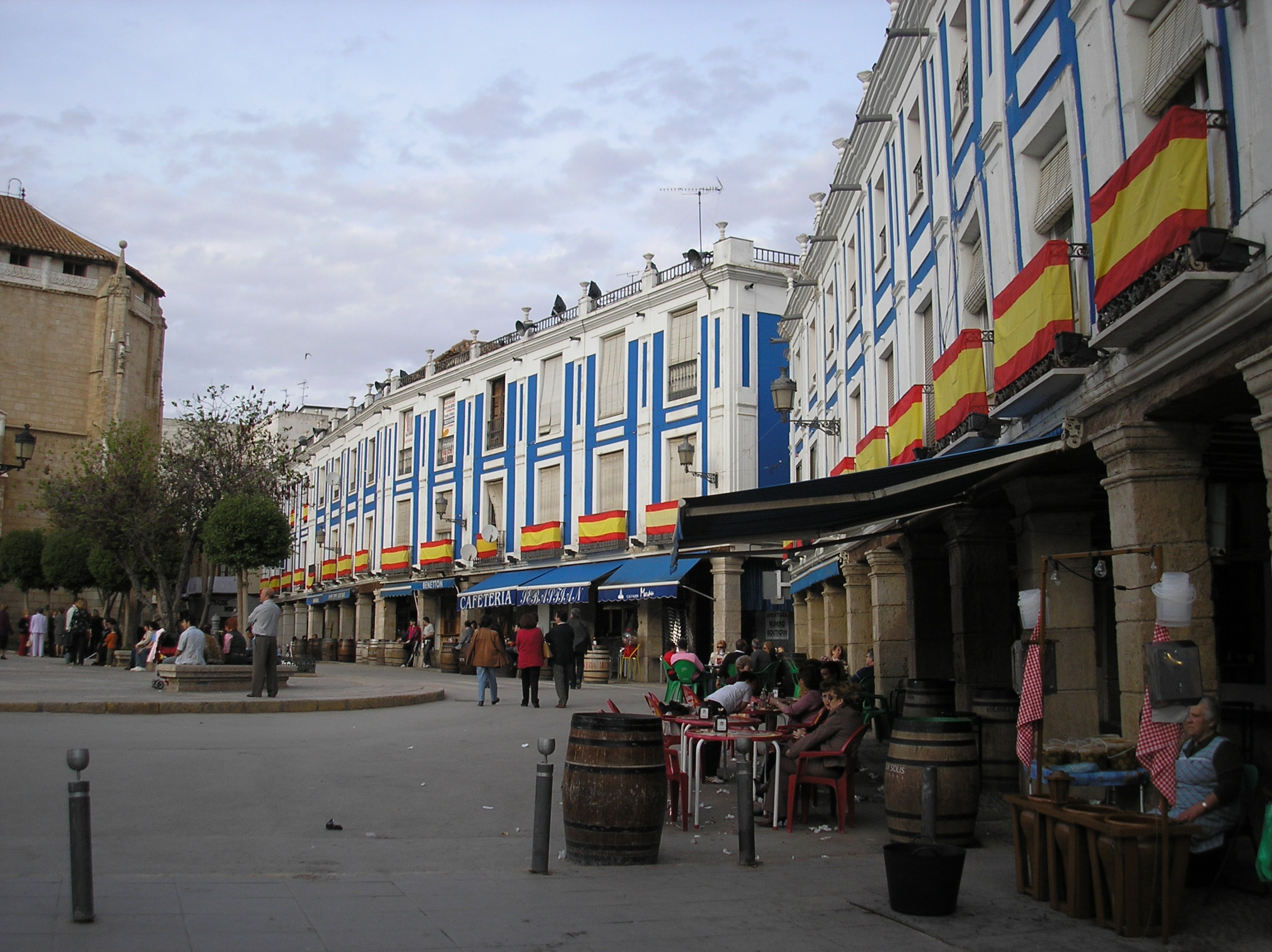 Plaza de España, Valdepeñas. Imagen propia del usuario Valdoria.